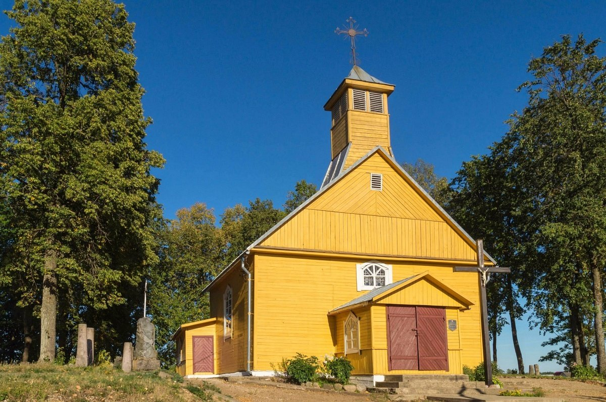 Пліса. Драўляны касцёл